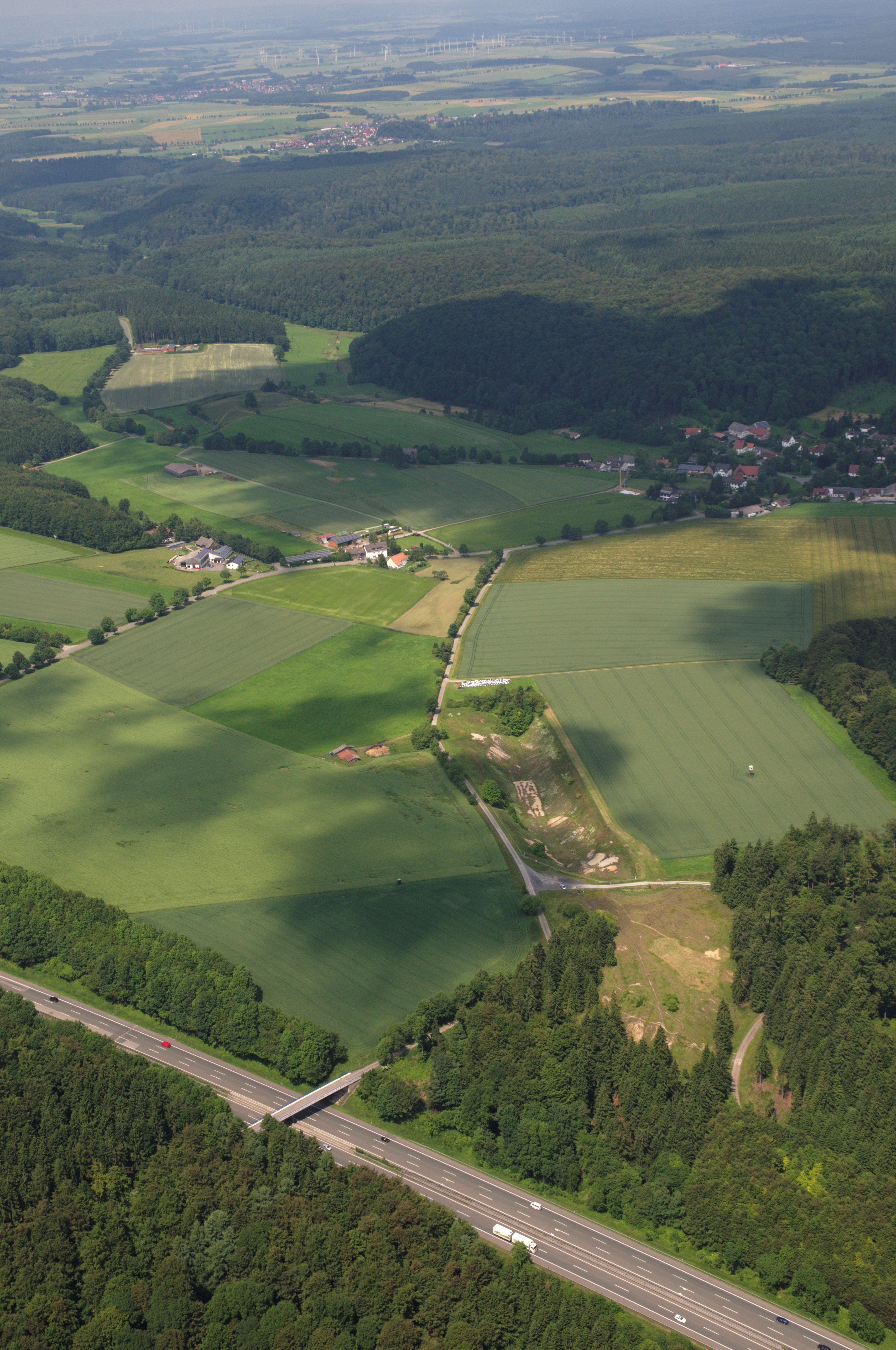 Fotoflug Sauerland-Ost: Bundesautobahn 44 (unten) und Lichtenau-Blankenrode (oben rechts), dazwischen an den Kreisgrenzen die Naturschutzgebiete „Bleikuhlen“ (NSG PB-005) in Lichtenau (Kreis Paderborn), „Bleikuhlen“ (NSG HSK-387) in Marsberg (Hochsauerlandkreis), „Bleikuhlen und Wäschebachtal“ (NSG HX-067K1) in Warburg (Kreis Höxter)